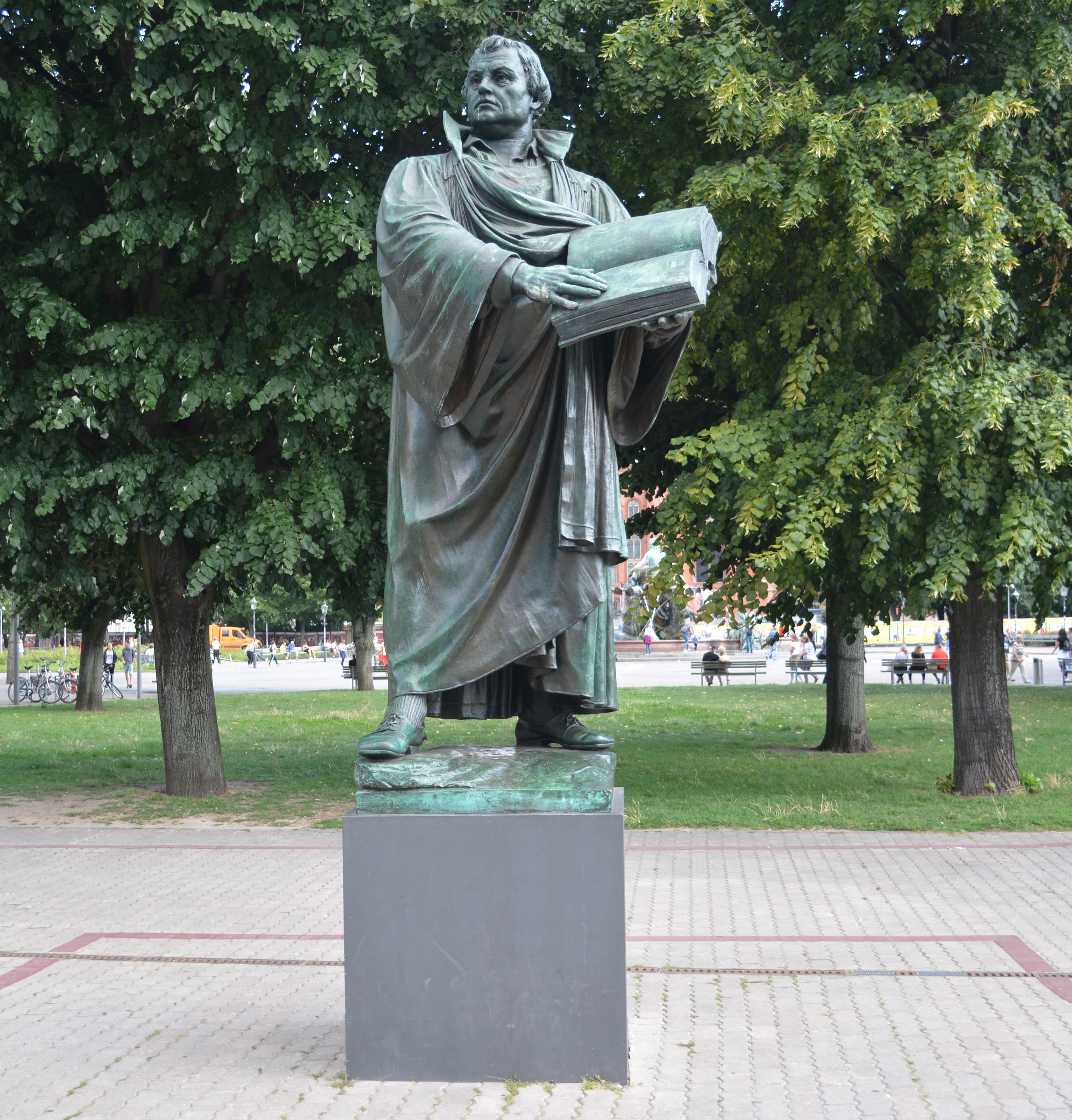 Das Martin-Luther-Denkmal wurde1895 auf dem ehemaligen Neuen Markt in Berlin-Mitte errichtet und befindet sich seit 1989 wieder an seinem ursprünglichen Standort vor der Marienkirche.